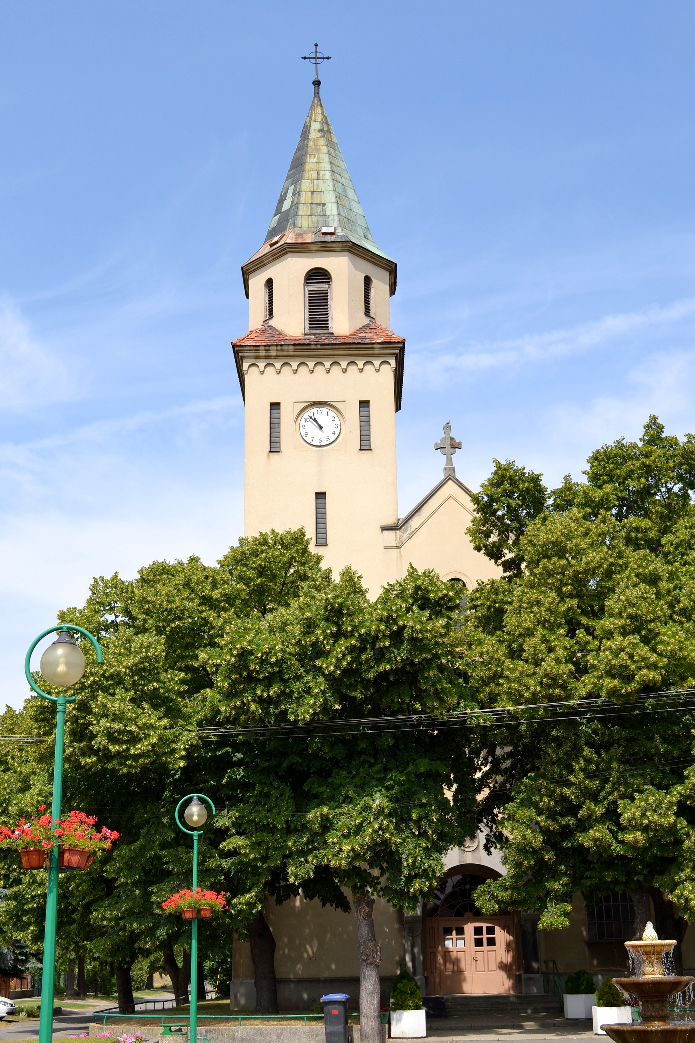 Neorománsky Kostol svätého Františka Serafínskeho z rokov 1927 - 1929 v centre Kalinkova